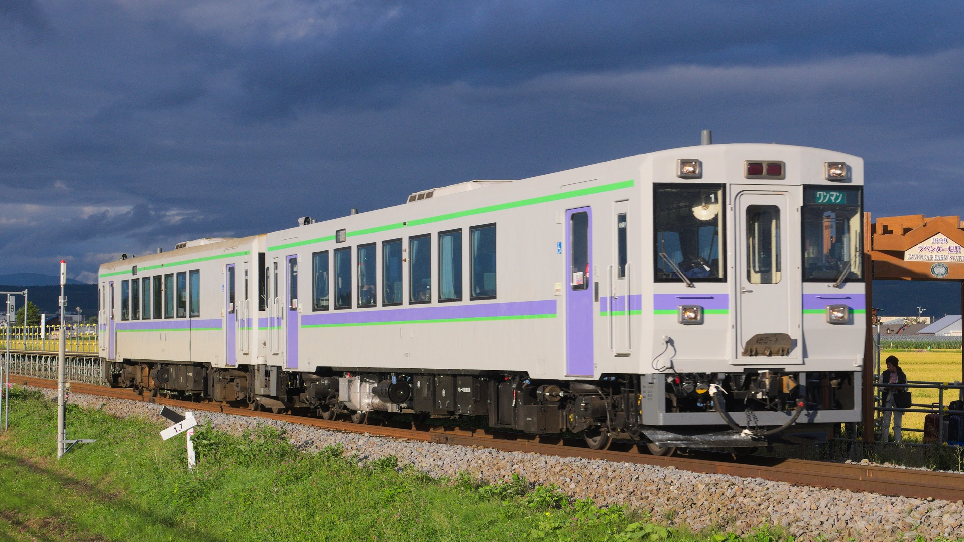 ラベンダー畑駅を通過するキハ150形